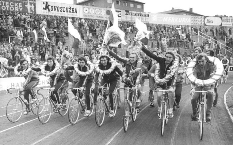 Friedensfahrt, Mannschaft der UdSSR ADN-ZB Reiche 22.5.77 Prag: 30.Internationale Friedensfahrt - Verdiente Ehrenrunde im Prager Slavia Stadion am 21.5.77. Die Sowjetische Vertretung erkämpfte sich überlegen den Mannschaftssieg der Jubieläumsfahrt. Gefeiert von den Zuschauern auch der Dritte der Gesamt-Einzelwertung, Tadsusz Mytnik (VR Polen-3.v.r.). Im Foto von rechts: Wladimir Osokin (zweiter der Einzelwertung), Asvo Pikkuus (Sieger der Friedensfahrt- Einzelwertung), Mytnik, Waleri Tschaplygin, "Kapitän" Alexander Gusjatnikow, Alexander Aweerin und Juri Zajao.